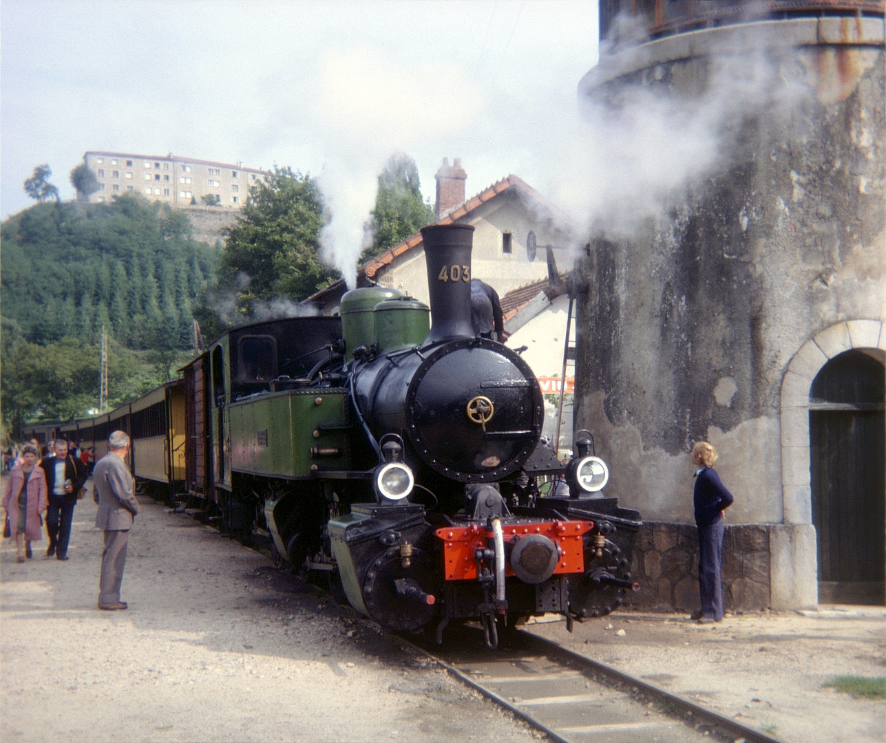 La locomotive Mallet N°403 du chemin de fer du Vivarais, en gare de Boucieu-le-Roi (Ardèche) le 21 septembre 1975.